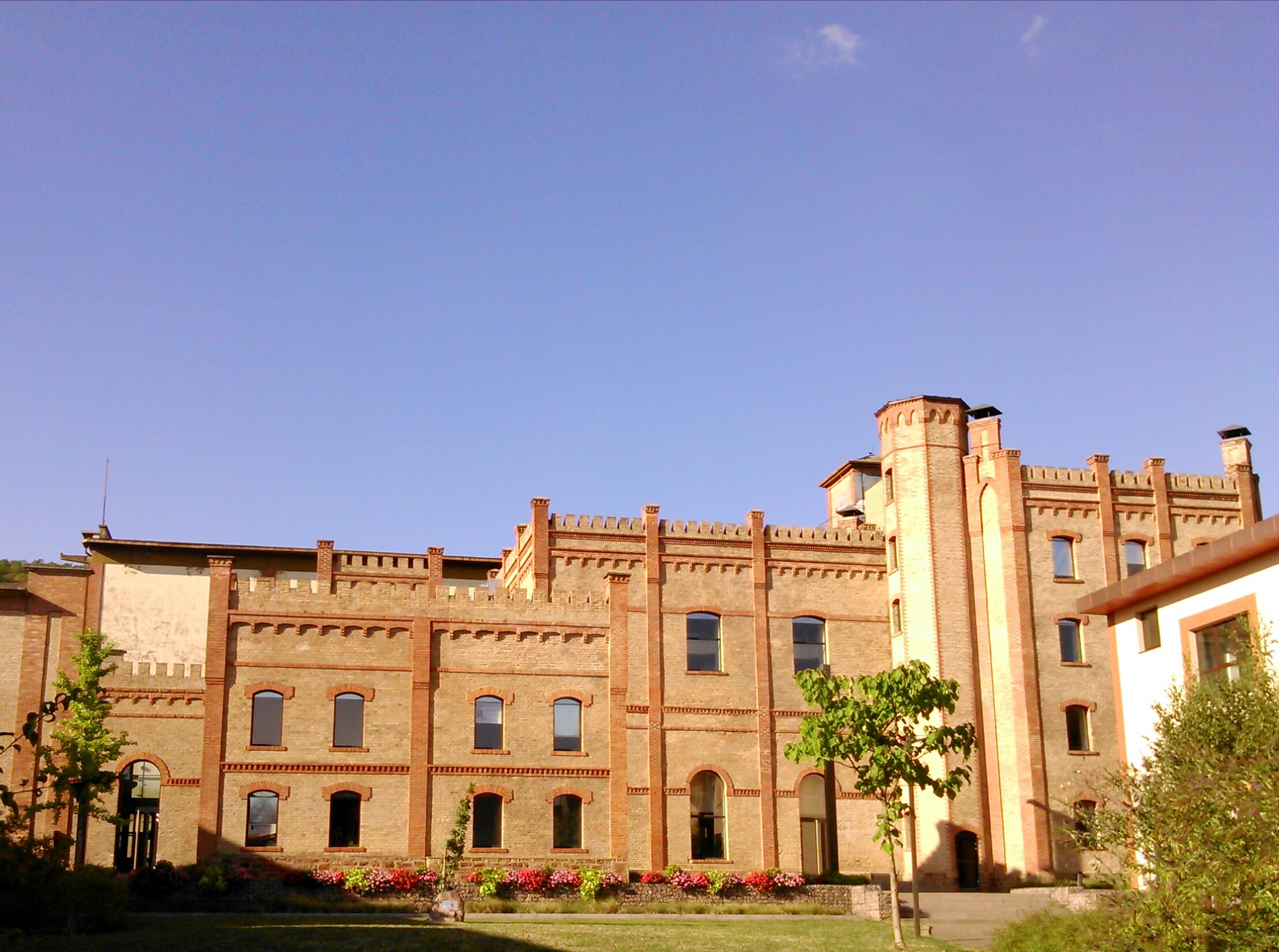 Ancienne brasserie Mutzig.